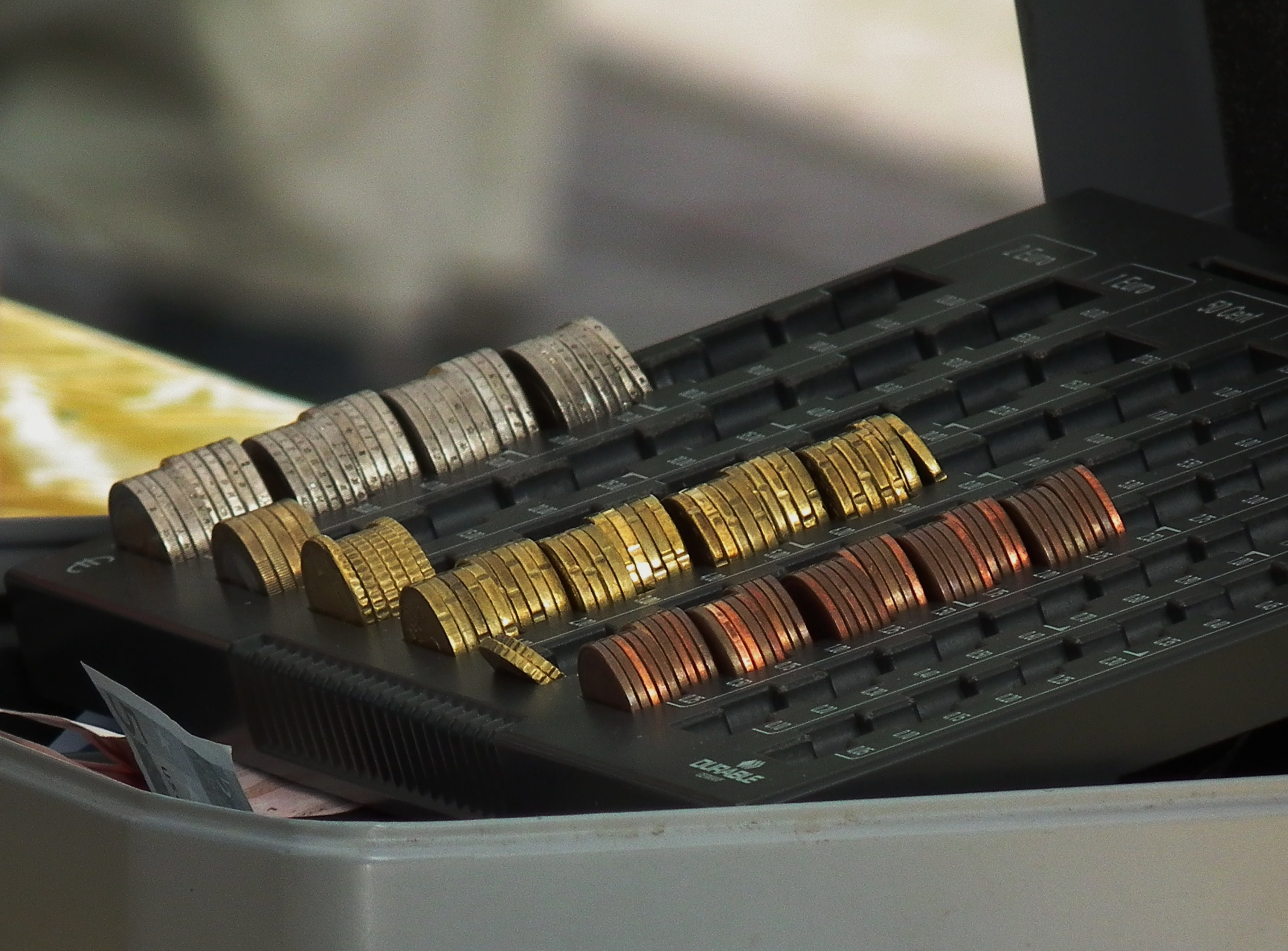 Münzeinsatz in Geldkassette, fotografiert in Deutschland